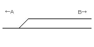 構内配線図 複線終端 左開き